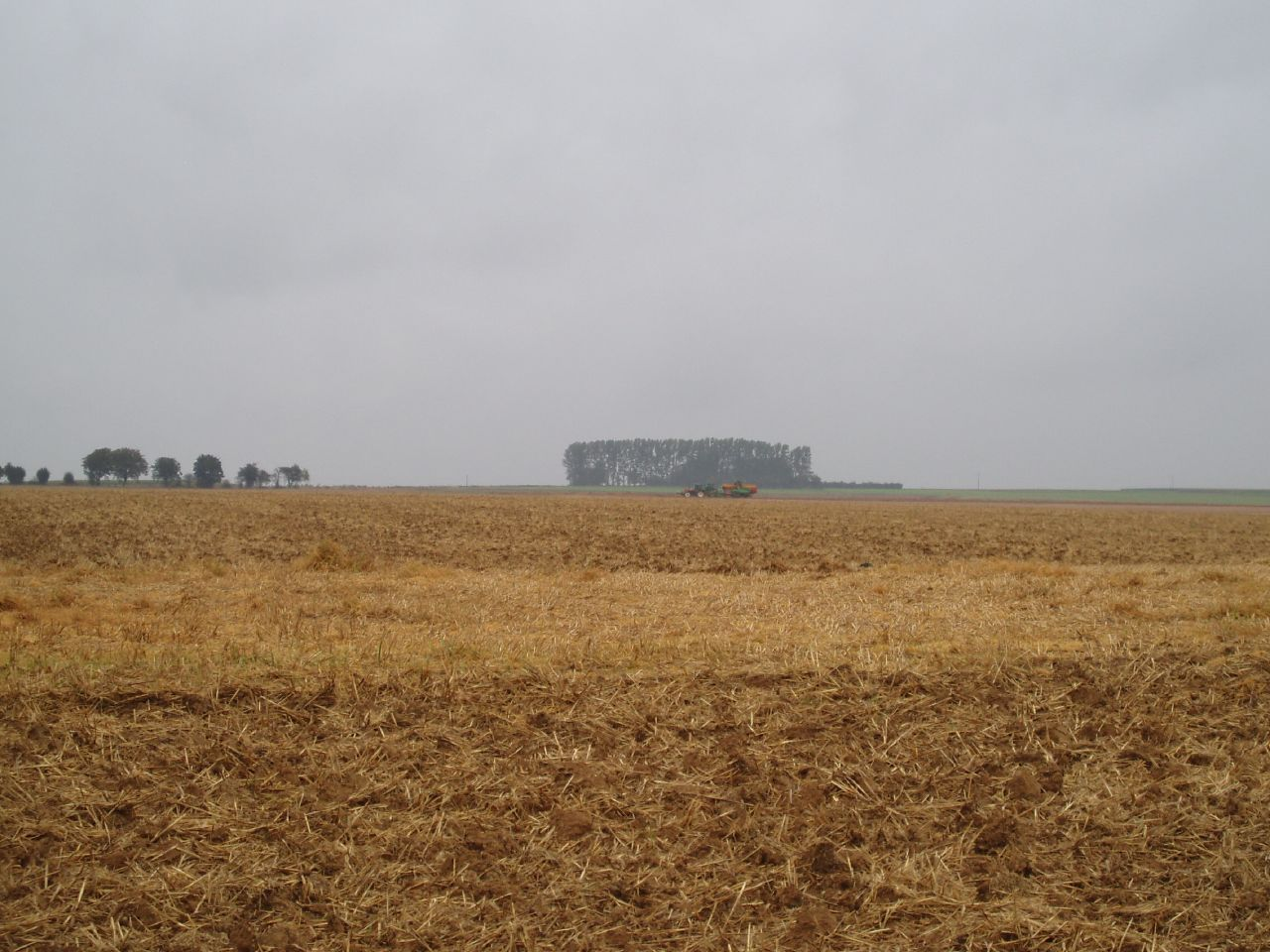 Contalmaison (Somme, France) Chaumes et paysage après moisson.